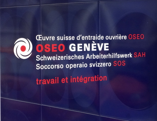 Logo de l'Œuvre suisse d'entraide ouvrière (OSEO) de Genève, sur la porte de la rue Pré-Jérôme 5, Plainpalais, Genève.